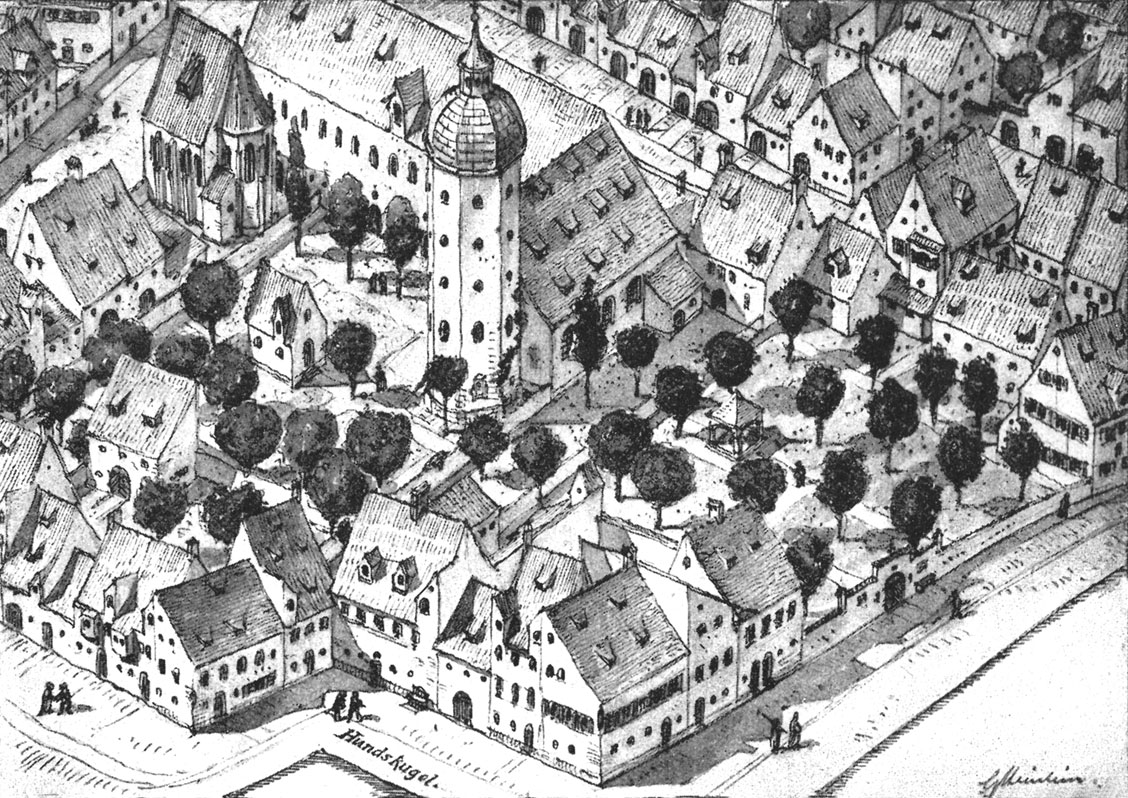 Abb. 49. Das St. Annakirchlein (in der jetzigen Damenstiftstraße) un das Indersdorfer Klosterhaus.